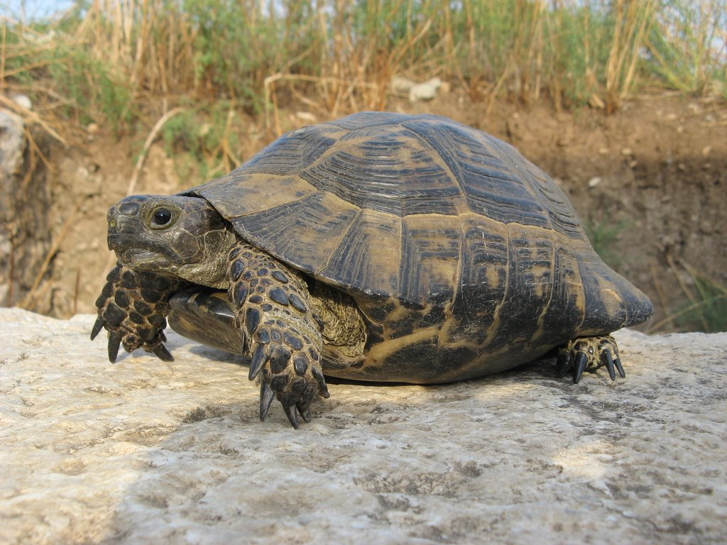 Tortoise, Patara, Lycia, Turkey